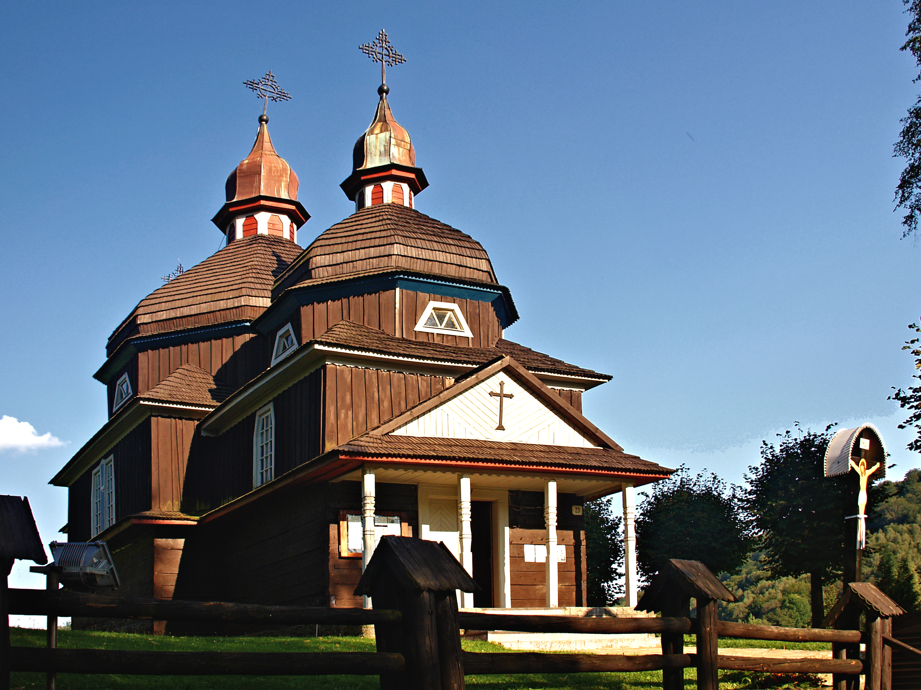 Nižný Komárnik (District de Svidnik - Prešovský kraj) - L'église catholique grecque Ruthène de la Protection de la Mère de Dieu